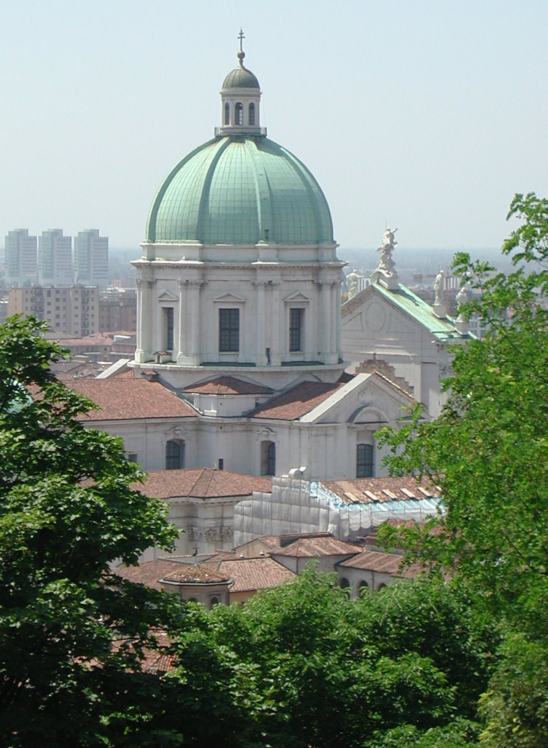 La veduta sul Duomo di Brescia dal Castello